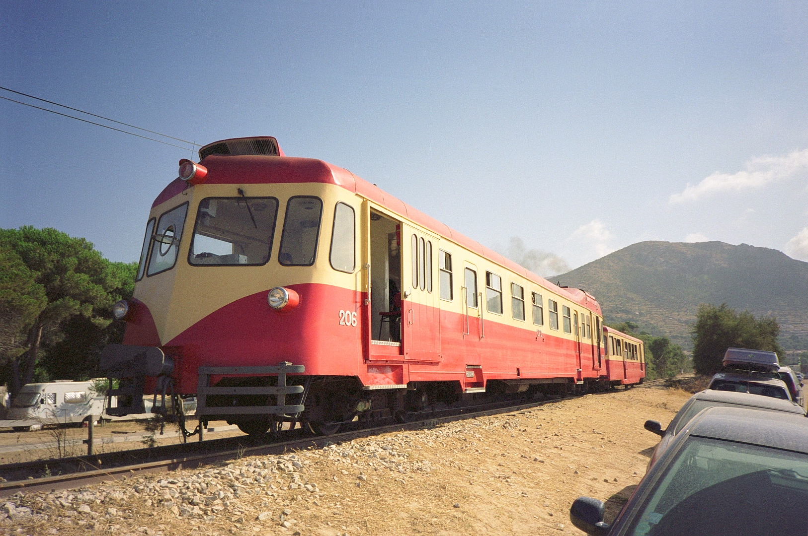 L'autorail ABH8 N°206 des chemins de fer de la Corse à Aregno-plage le 20 juillet 2005.